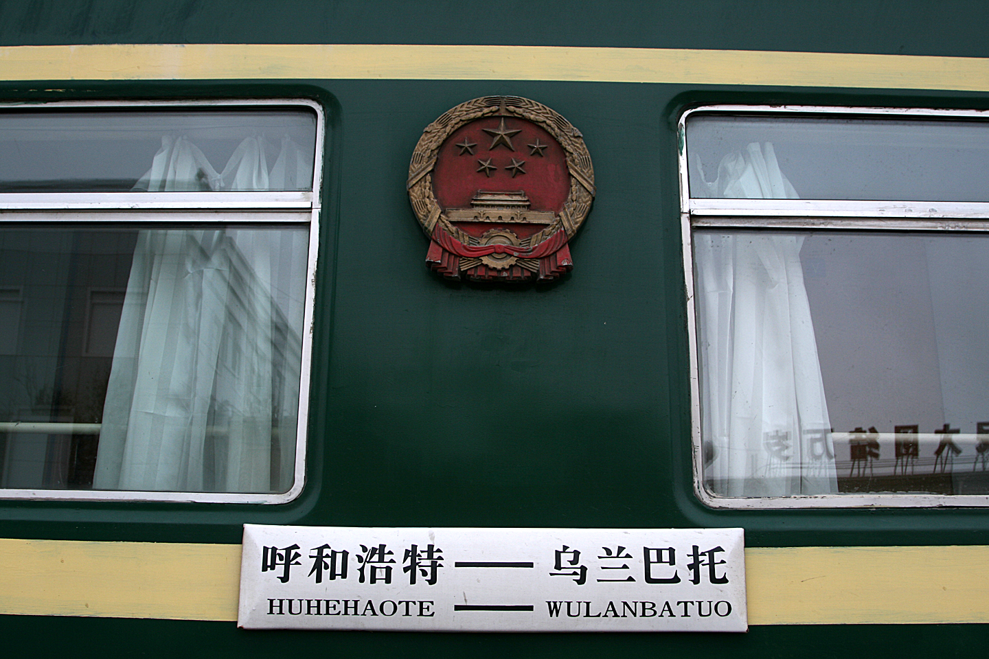 呼和浩特－乌兰巴托国际列车